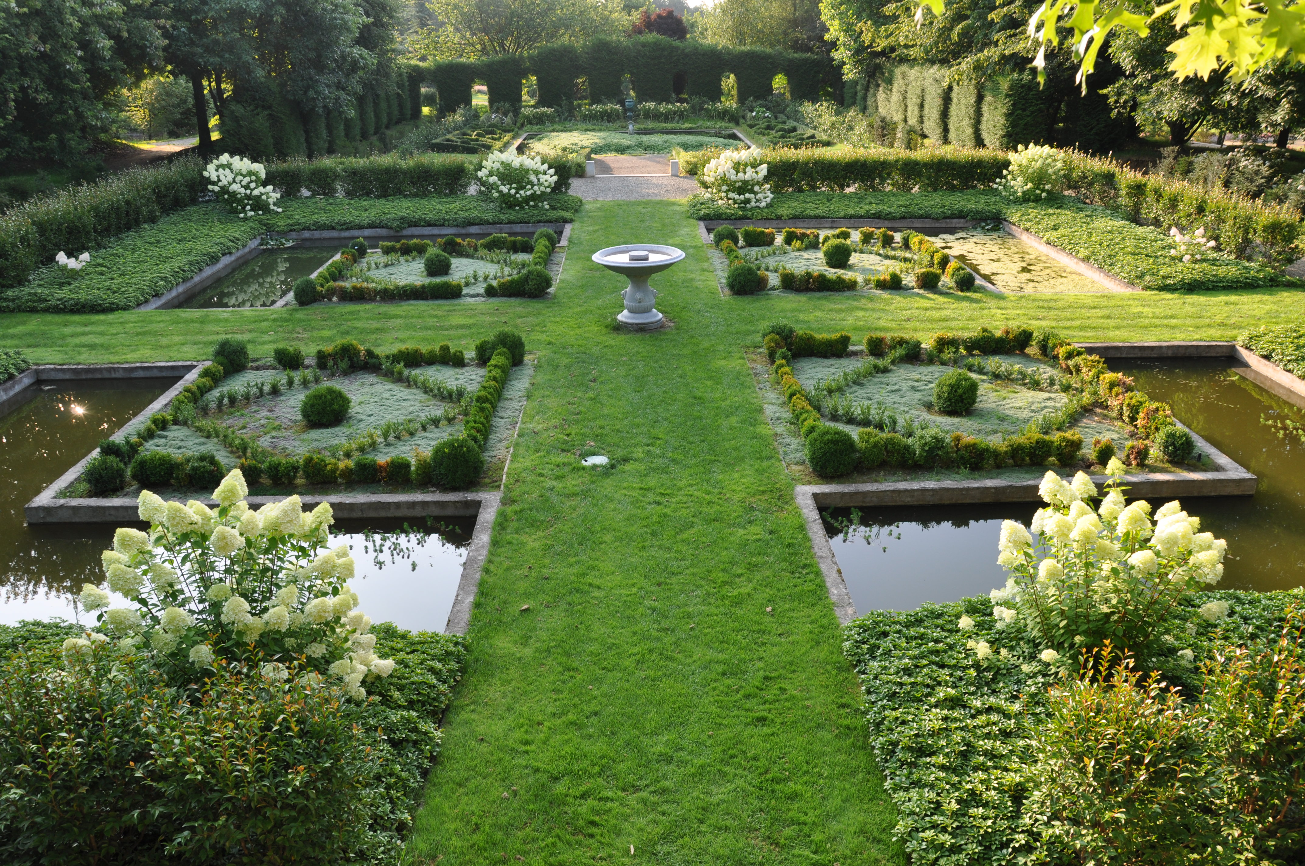 Au Parc Botanique de Haute Bretagne